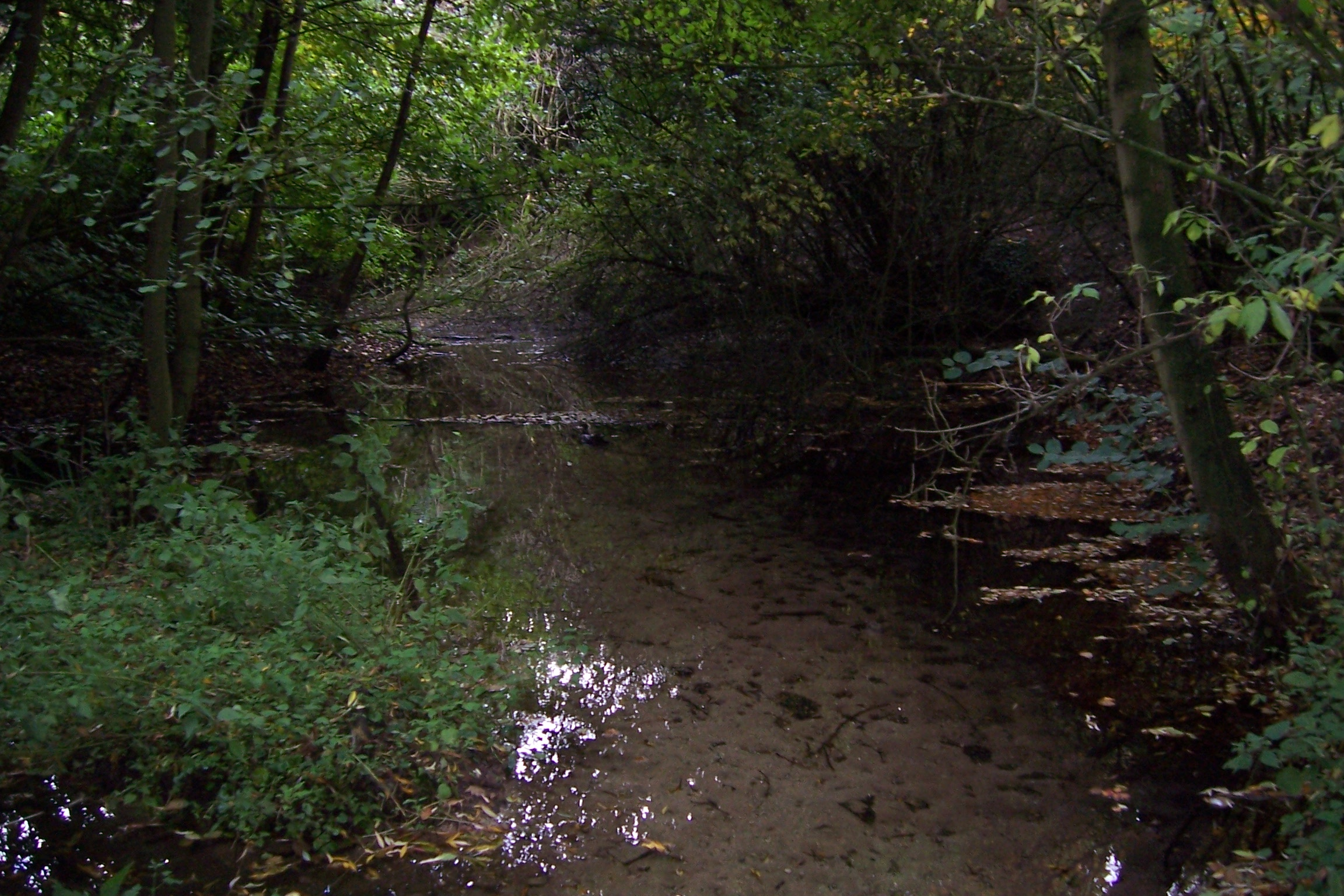 Die Sieben Quellen in Coesfeld.